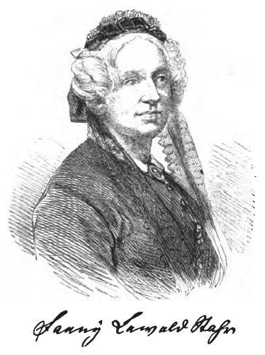 Fanny Lewald (1811-1889). Aus: Illustrirte Geschichte des deutschen Schriftthums in volksthümlicher Darstellung. 1881. S. 429